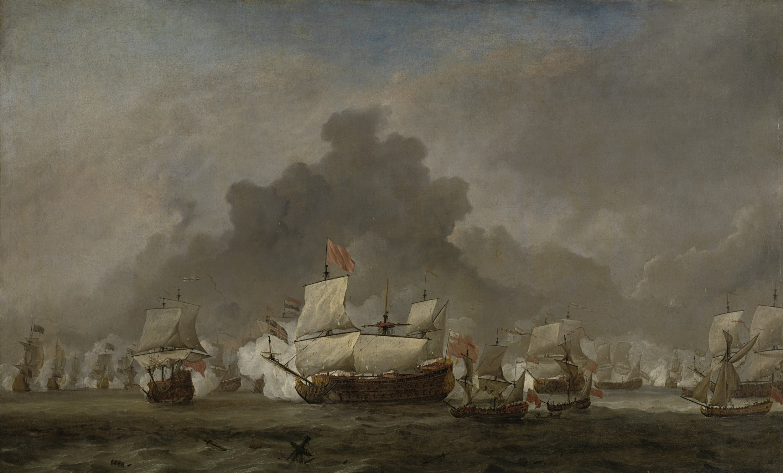 Het gevecht van Michiel Adriaensz de Ruyter tegen de hertog van York op de 'Royal Prince' tijdens de zeeslag bij Solebay, 7 juni 1672: episode uit de Derde Engelse Zeeoorlog (1672-74). In het midden vaart het Engelse schip, zonder het bovendeel van de mast. Rond dit schip zeilen enkele kleine schepen.